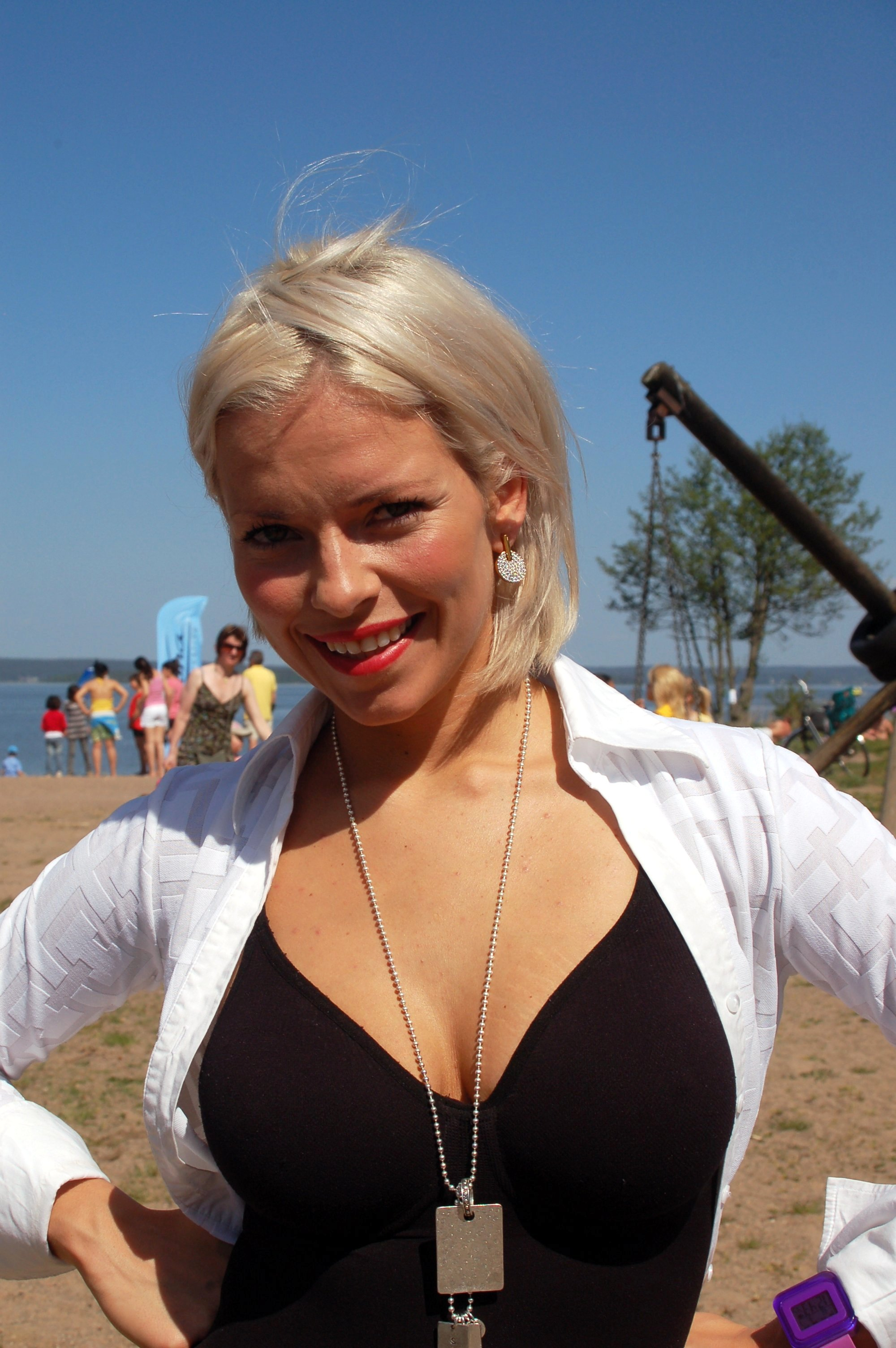 Petra "September" Marklund besöker Lindö i Norrköping. Foto: Daniel Åhs Karlsson